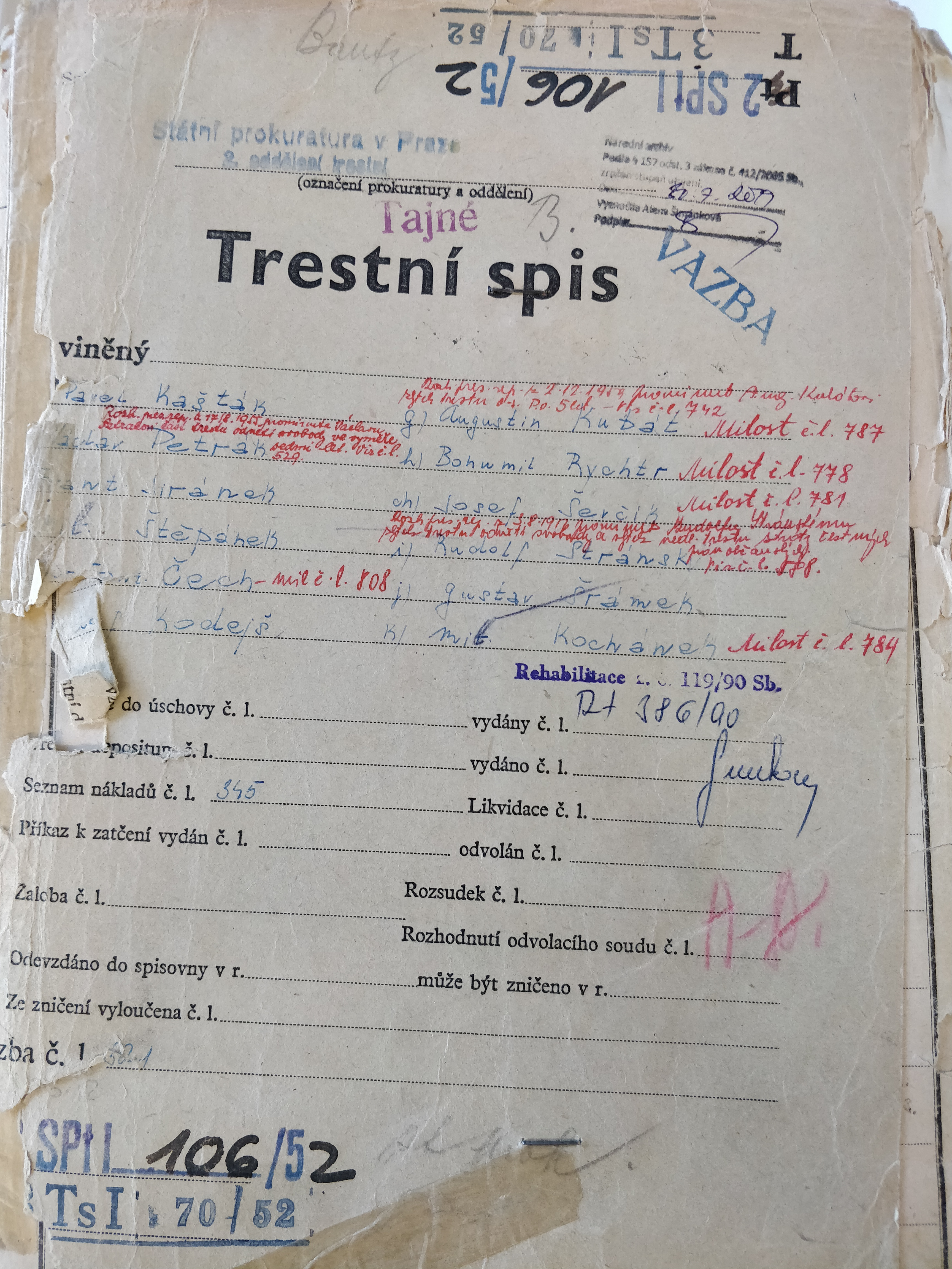 Obal trestního spisu Státní prokuratury v Praze SPtI 106/52 obžaloby, vedené proti odbojové skupině Pavla Kašťáka, označované jako "velezrádci a špioni z Jilemnicka". Pořízeno v badatelně Národního archivu, pracoviště Chodovec.